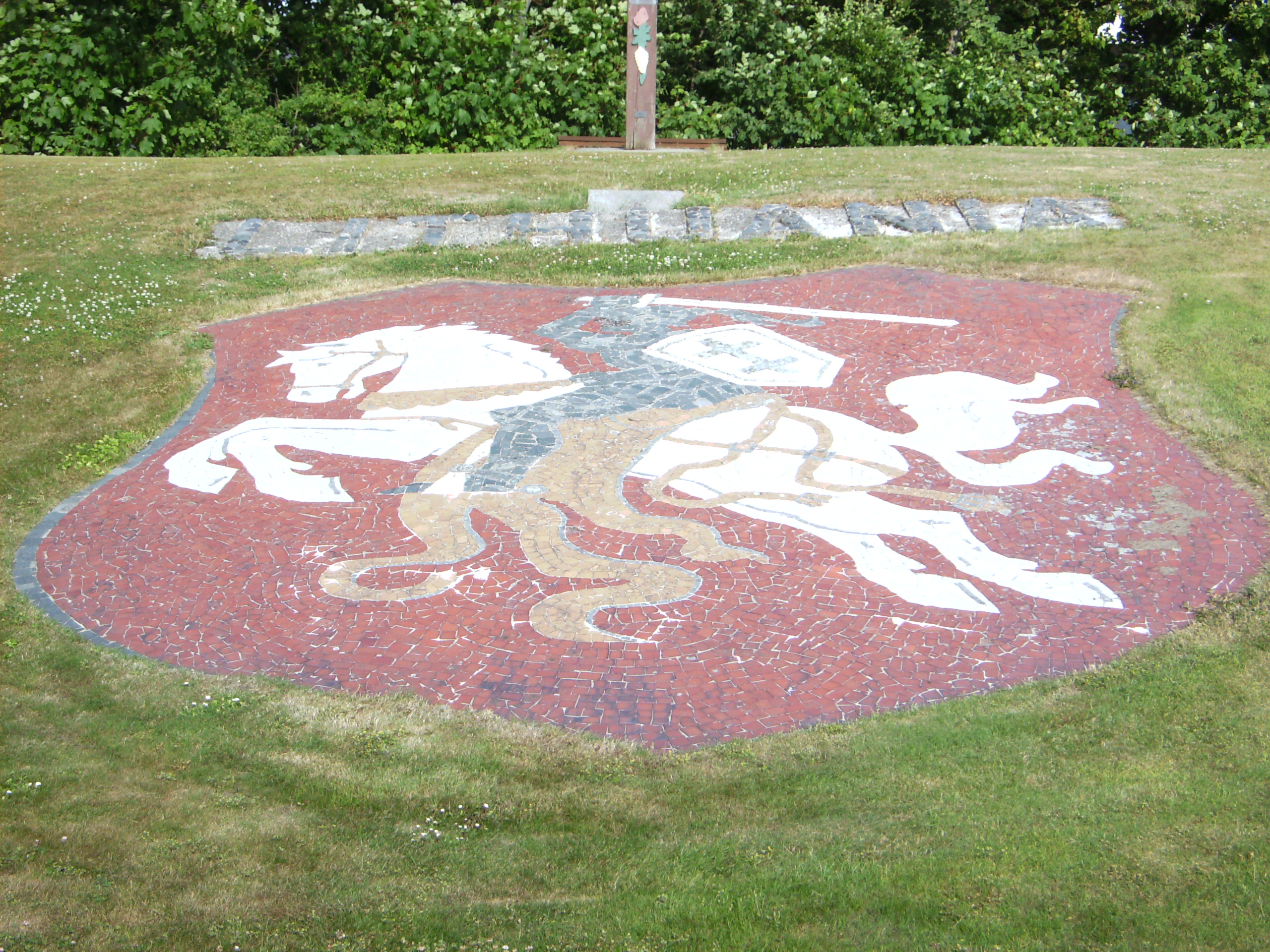 Dragsbæklejren lå syd for Thisted og blev bygget under 2. Verdenskrig som tysk vandflyverstation Former station for hydroplanes during the german occupation of denmark in World War 2 Mindesmærke for Dragsbæklejrens tid som flygtningelejr Memorial made by refugees after World War 2